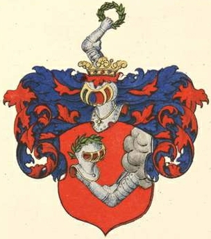 Helmerseni suguvõsa aadlivapp